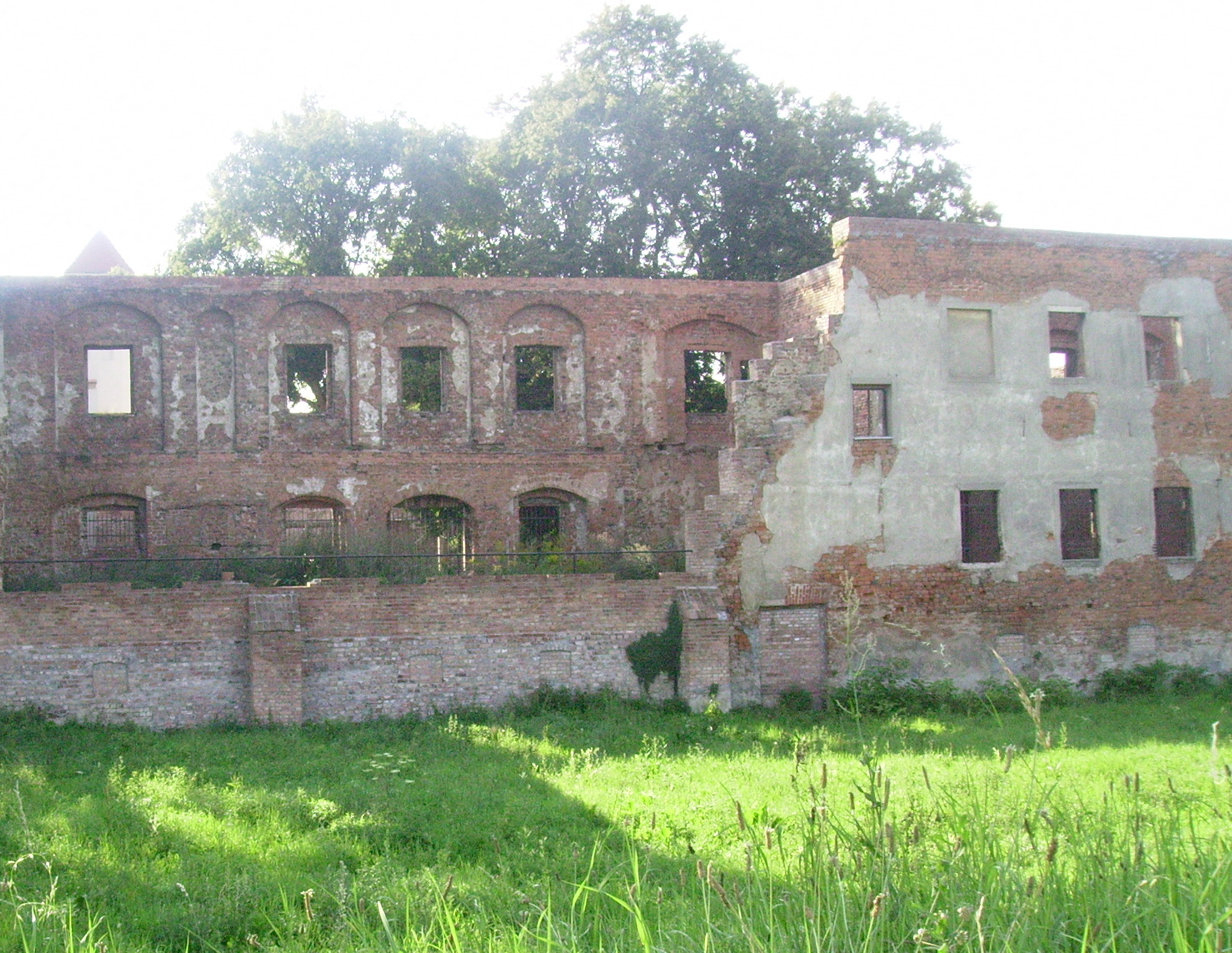 Zamek w Krośnie Odrzańskim - widok od wschodu